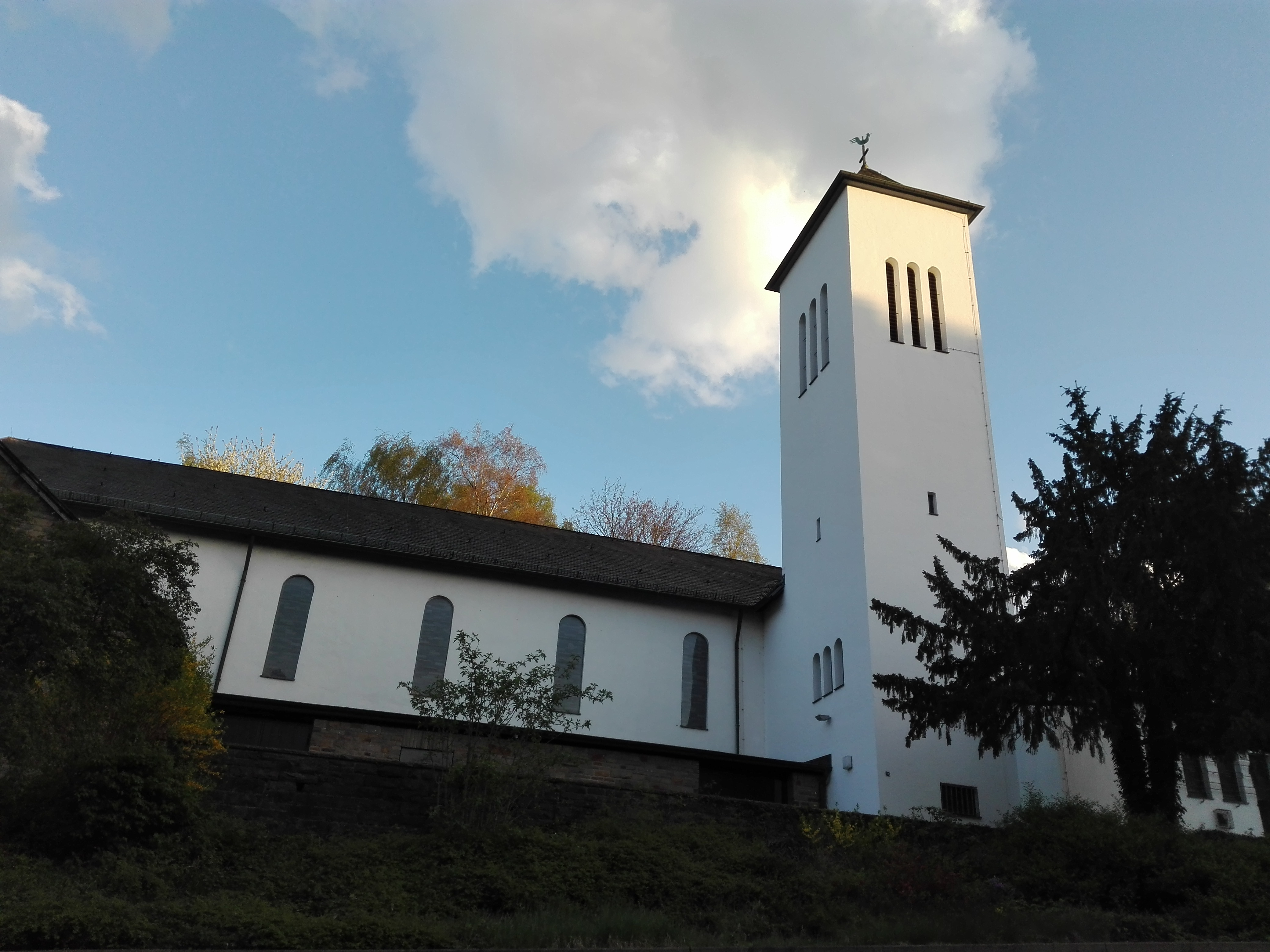 Sankt Elisabeth Wuppertal-Heckinghausen